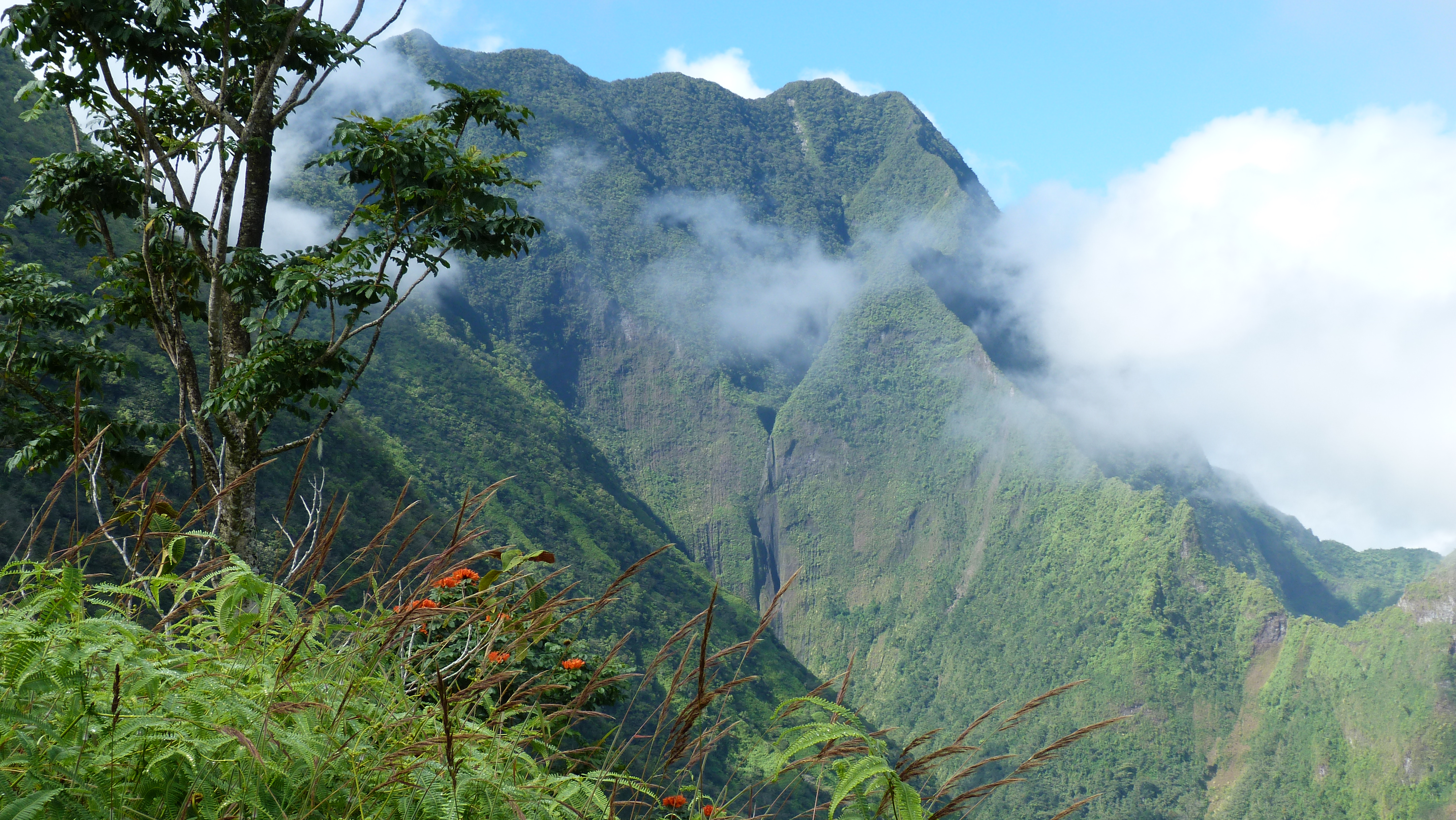 Mont Aorai